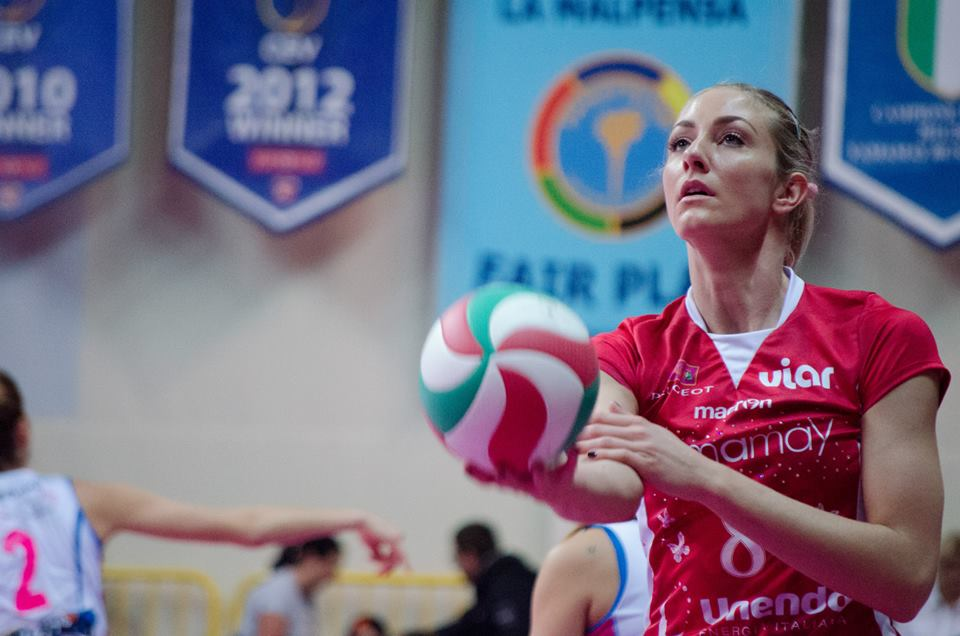 Pallavolista statunitense, gioca nel ruolo di schiacciatrice ed opposto